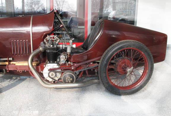 Schasche Cyclecar von 1928 mit belgischem Sarolea 500ccm Motorradmotor und Kettenantrieb.Gebaut um den Cyclecarweltrecord (108km/h) 1929 in Wien zu brechen.